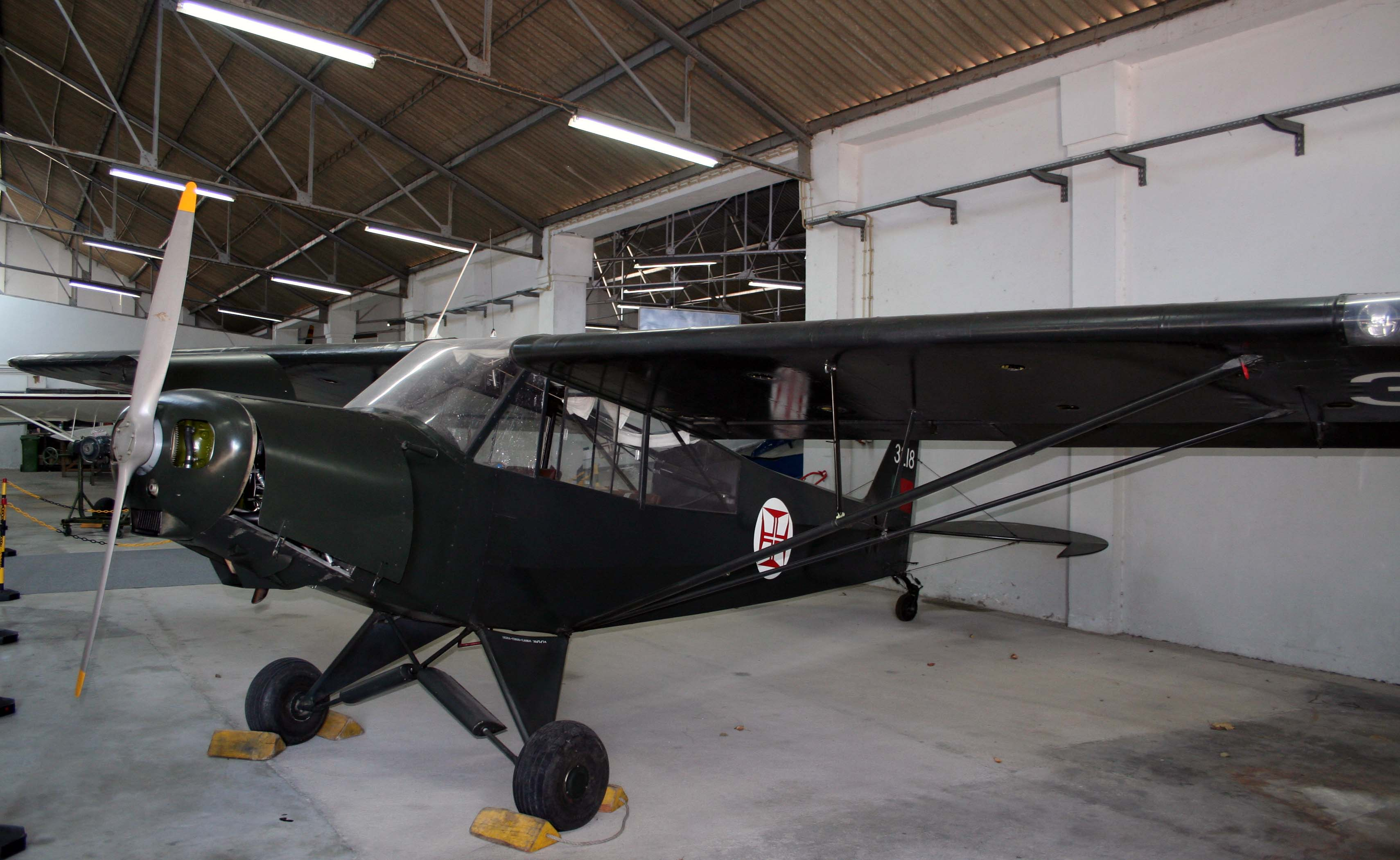 Piper Pa-18/L-21 Super Cub Portuguese Air Force Military Aircraft - Piper Pa-18/L-21 Super Cub Source/Author Soares da Silva Portuguese Air Museum